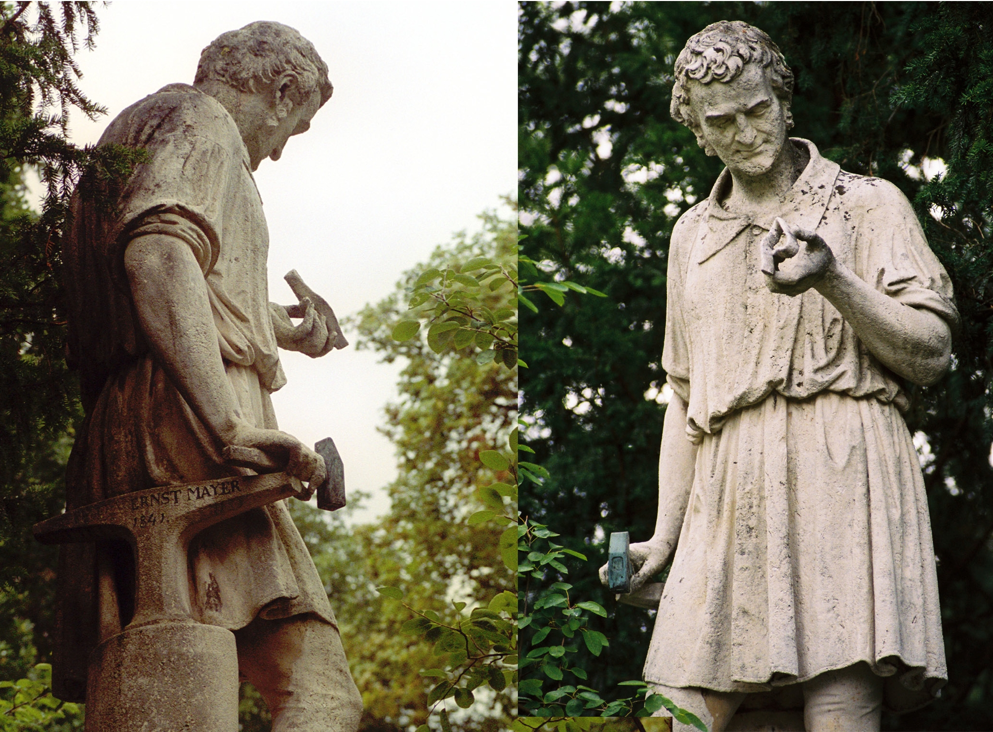 Monument of Johnann Georg Heine in Würzburg made by Ernst Mayer in 1841